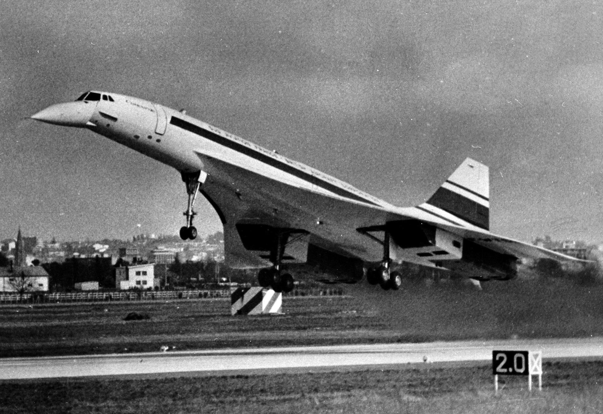 Pistes de Blagnac. 2 mars 1969. Gros plan d'une photo du Concorde au décollage ou à l'atterrissage scotchée sur un support. Cliché pris lors du 1er vol d'essai du Concorde.